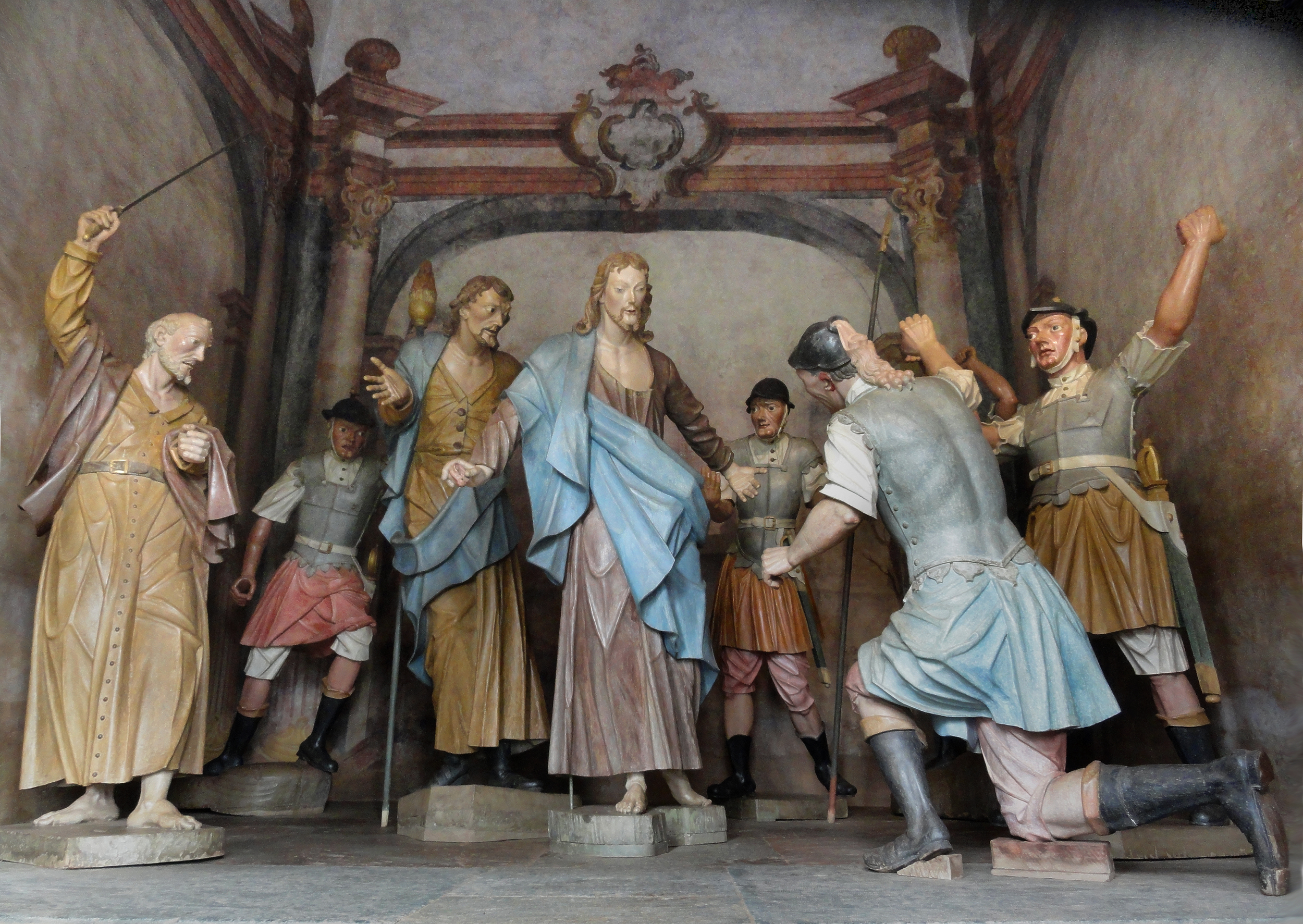 Santuário de Bom Jesus de Matozinhos: conjunto arquitetônico, paisagístico e escultórico. Aleijadinho: Cena da prisão de Jesus - Jesus restaura a orelha de Malco.